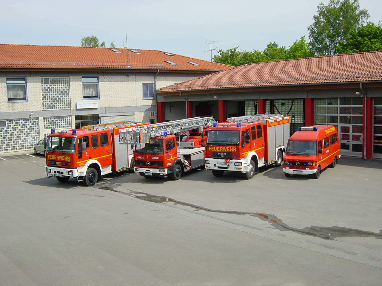 Löschzug der Feuerwehr Hofgeismar